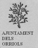 Escudo del Municipio de Orriols, desaparecido en 1882.